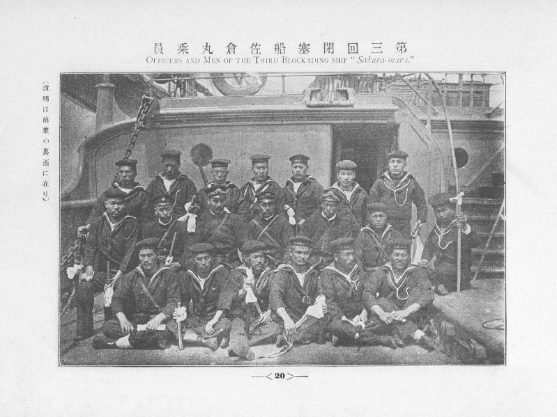 第三回旅順閉塞隊佐倉丸乗員